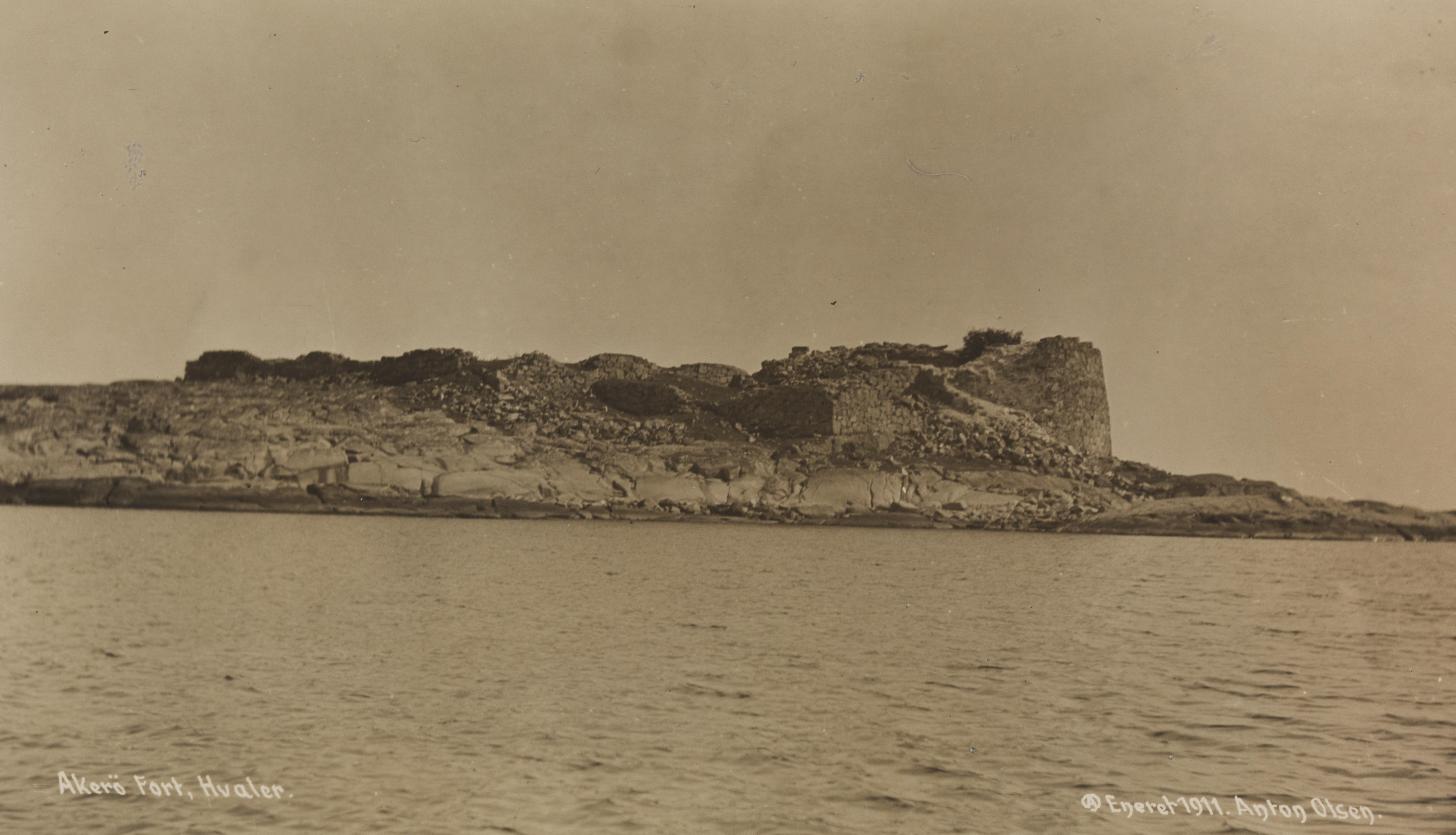 Bildet er hentet fra Nasjonalbibliotekets bildesamling Akerøy, Hvaler, Østfold